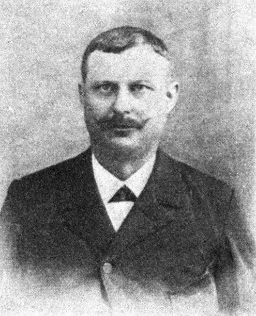 Österreichischer Politiker, Reichsratswahl 1907, Name siehe Dateiname